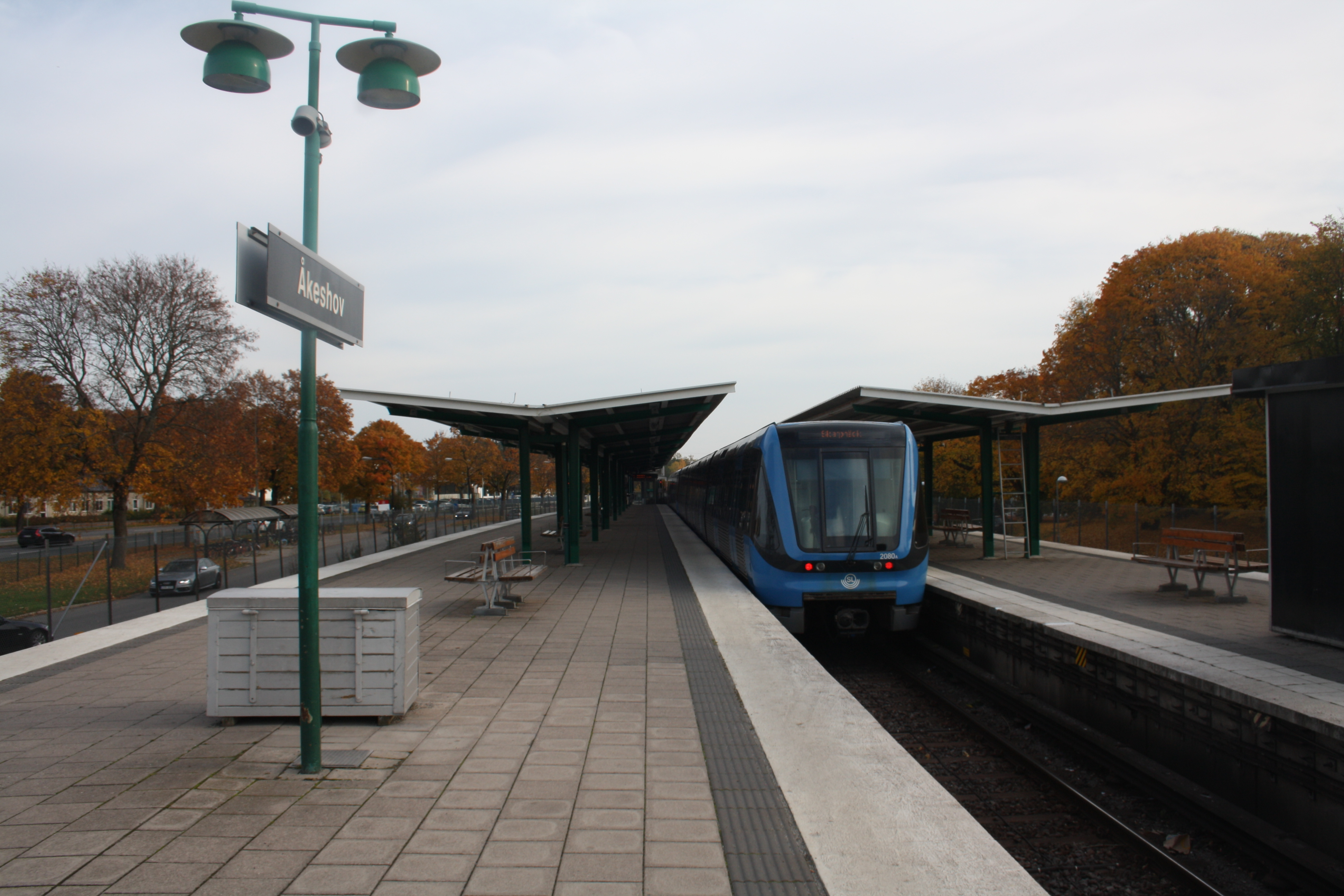 Åkeshov tunnelbana